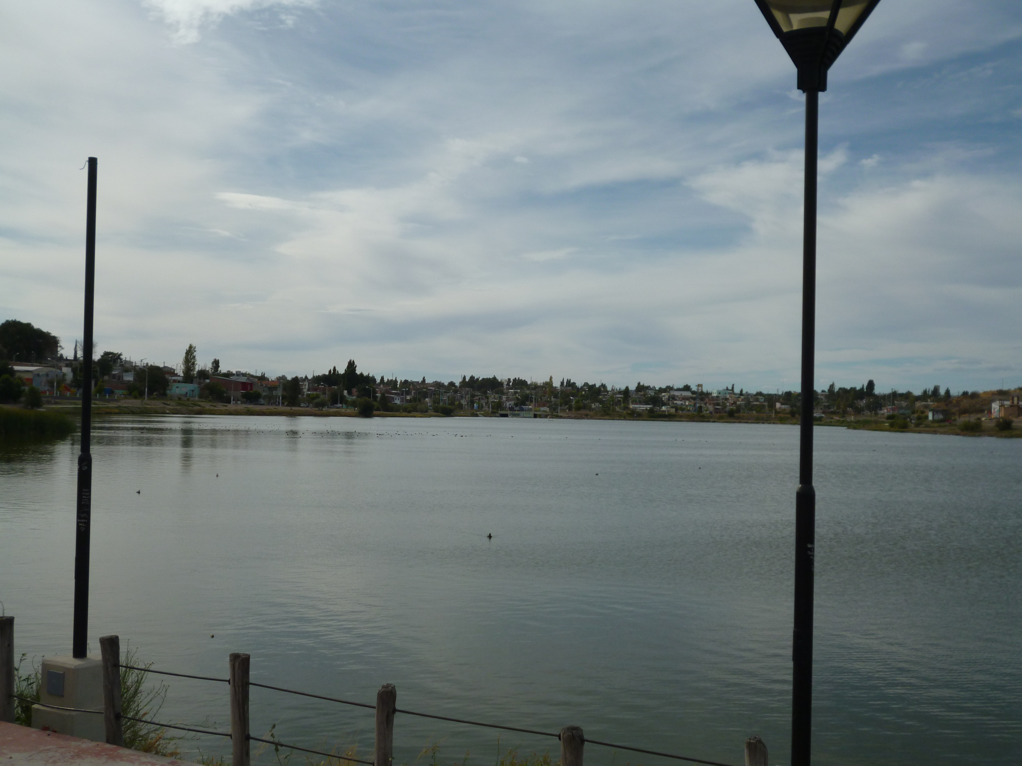 Laguna Chiquichano